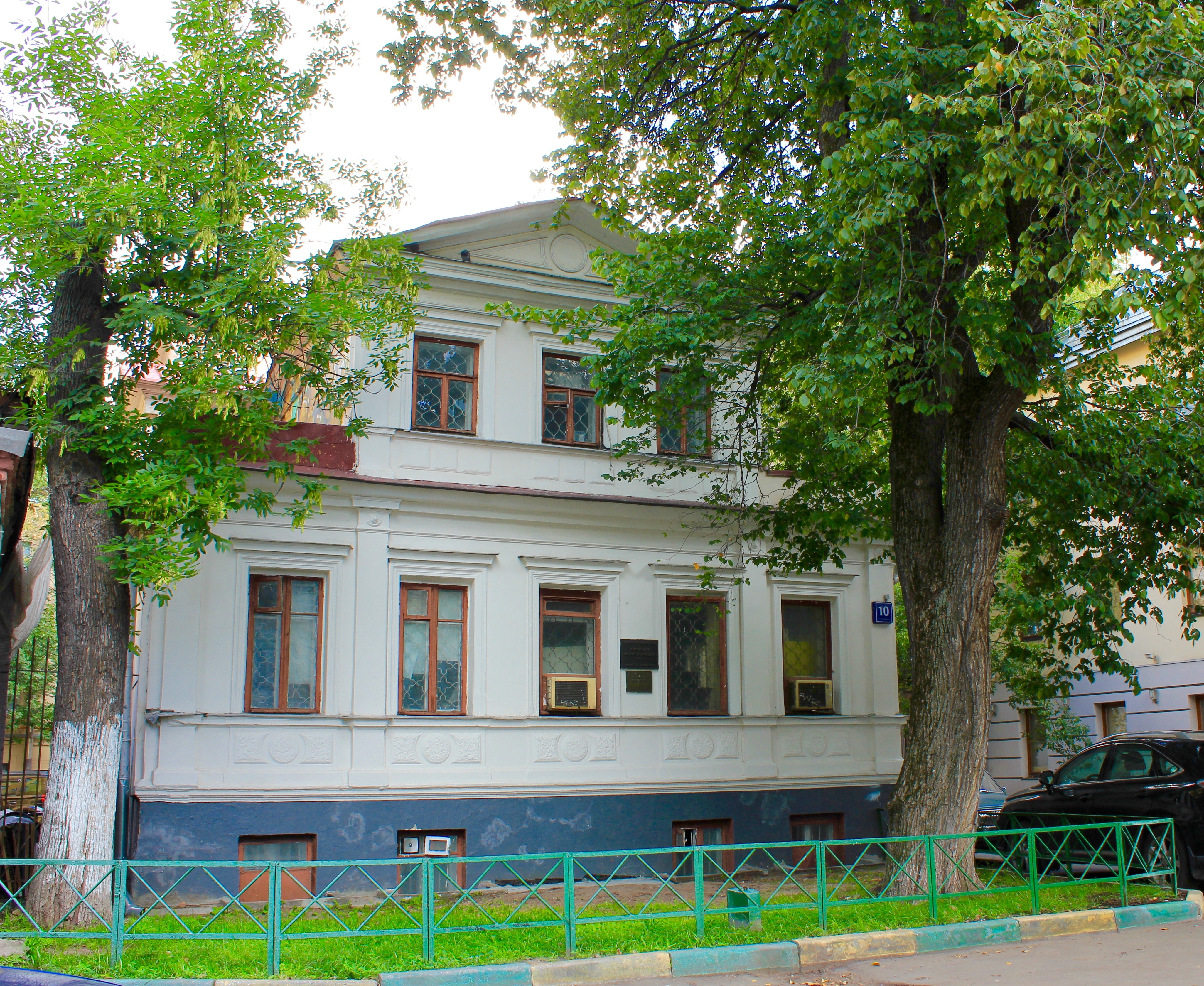 Жилой дом А.В.Остроумовой: Воротниковский пер., дом 10, строение 2, Тверской, Центральный округ, Москва